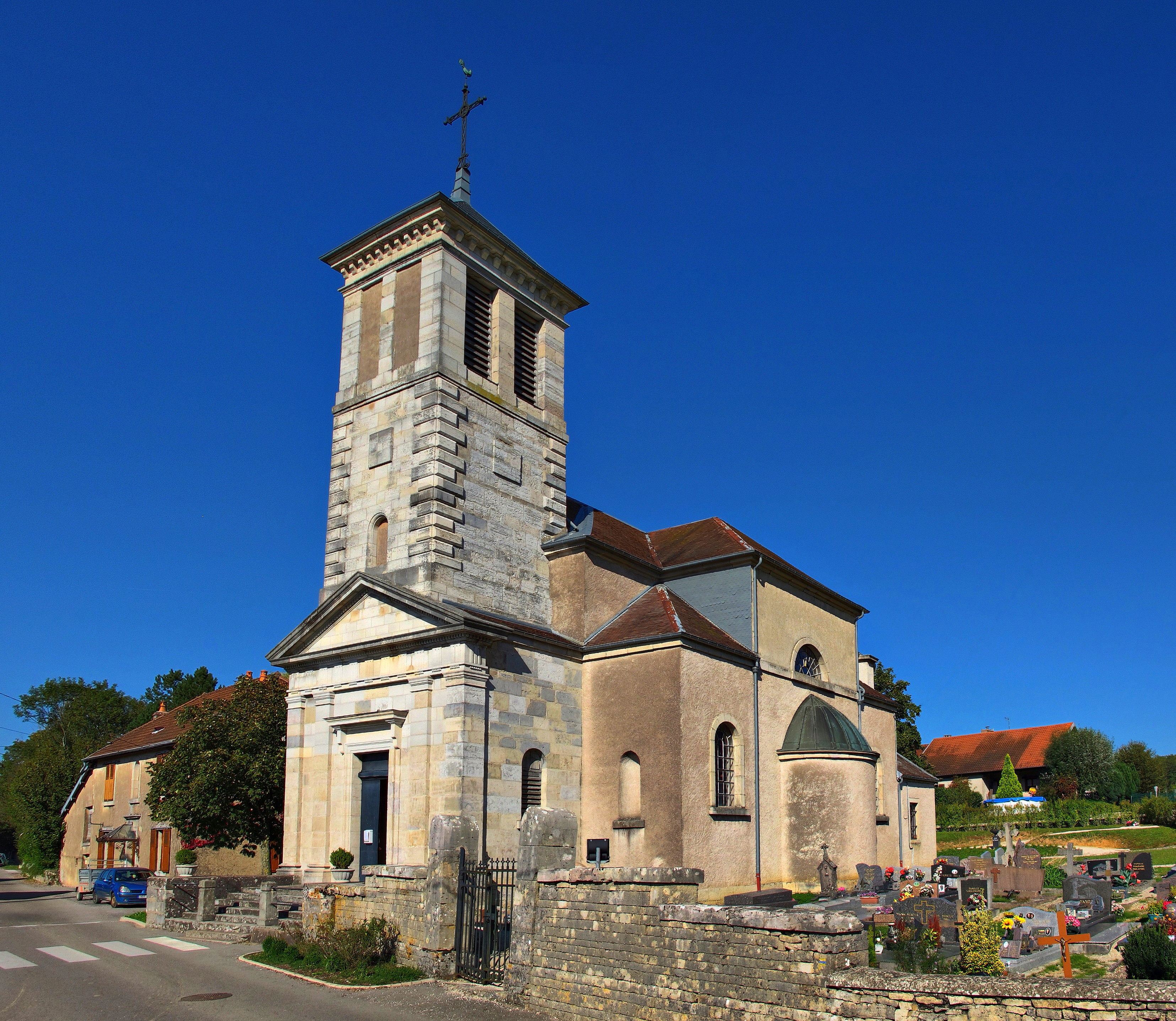 Église Saint-Martin de Venise (Inscrit) .